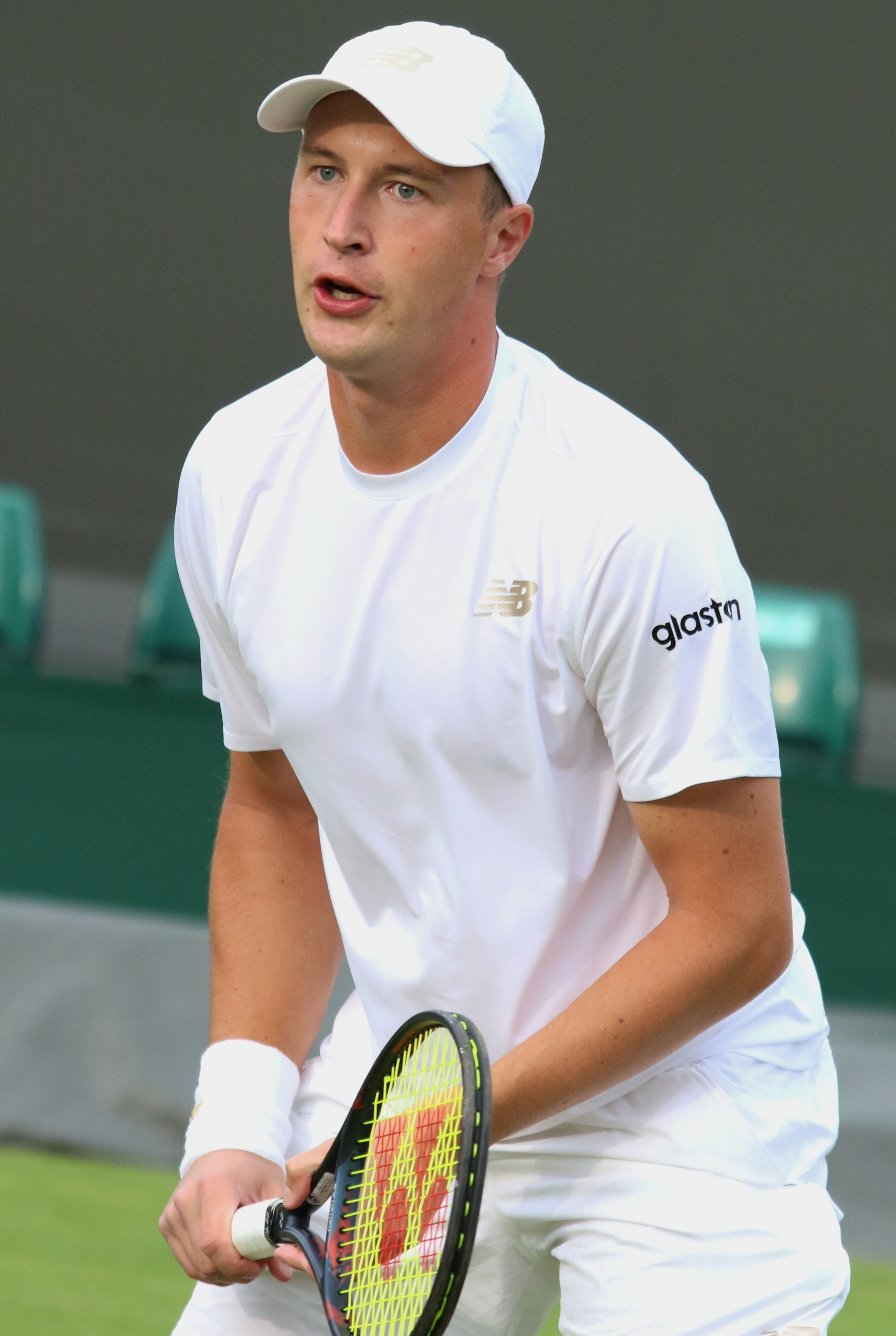 Kontinen WM19 (17)